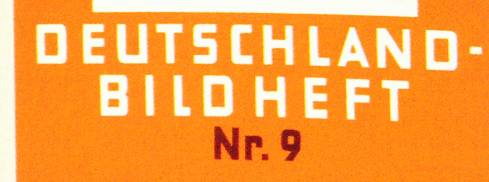 Deutschland-Bildheft Fußzeile des Bucheinbands zu Nummer 9 1933